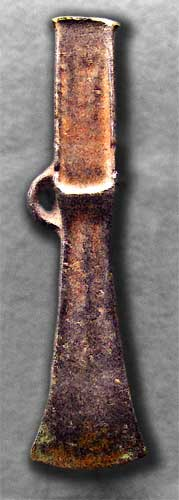 Hacha de talón y una anilla (palstave) de procedencia desconocida, provincia de Valladolid (Bronce atlántico 1 100-800 adC). Se conserva en el Museo Arqueológico de Valladolid